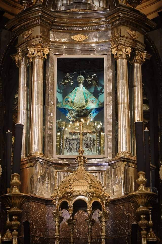 Imagen religiosa de culto católico venerada en la ciudad de San Juan de los Lagos, en el edtado mexicano de Jalisco